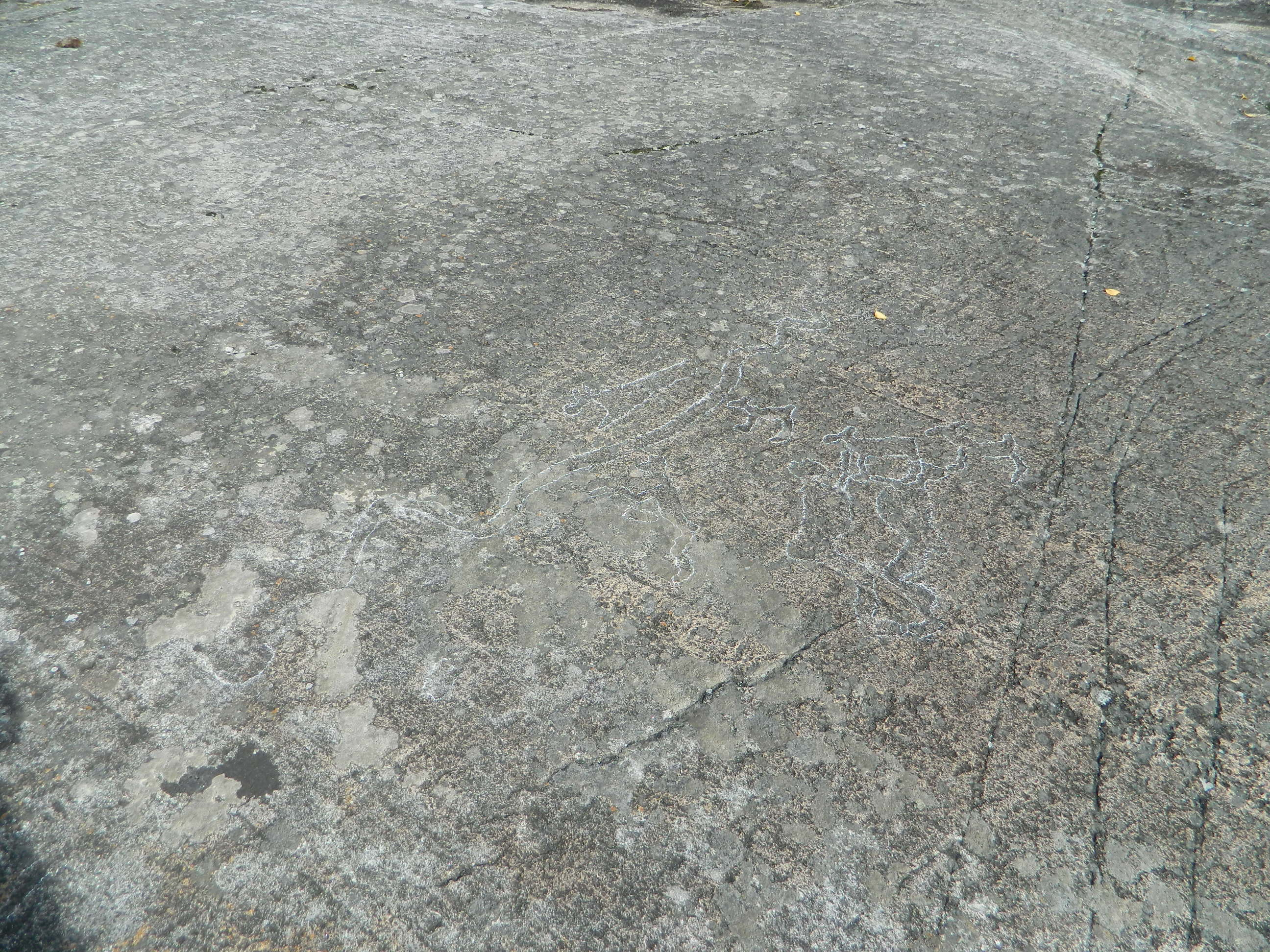 Петроглифы неподалёку от Беломорска